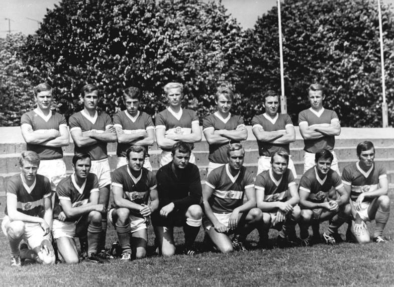 Zentralbild-Sindermann-29.7.70-ma-Rostock: Fußball-Oberligamannschaft des FC Hansa Rostock. Stehend v.l.: Gerd Kirsche (18 Jahre), Herbert Pankau (28), Dieter Lenz (21), Helmut Schühler (27), Joachim Streich (19), Klaus-Peter Stein (23) und Lothar Hahn (22). 1. Reihe v.l.: Christian Radtke (20), Jürgen Decker (24), Gerd Sackritz (27), Torwart Jürgen Heinsch (30), Manfred Rump (29), Klaus-Dieter Seehaus (27), Helmut Hergesell (28) und Axel Bergmann (20).